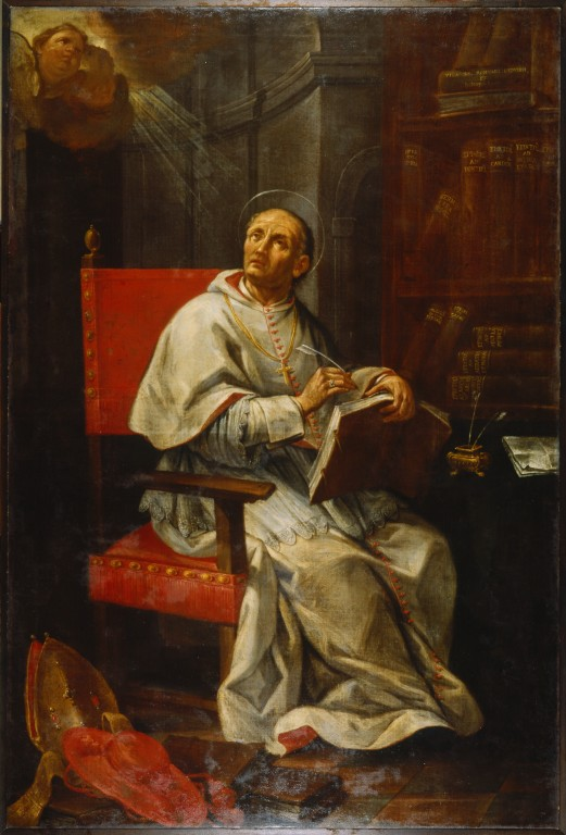 San Pedro Damiani